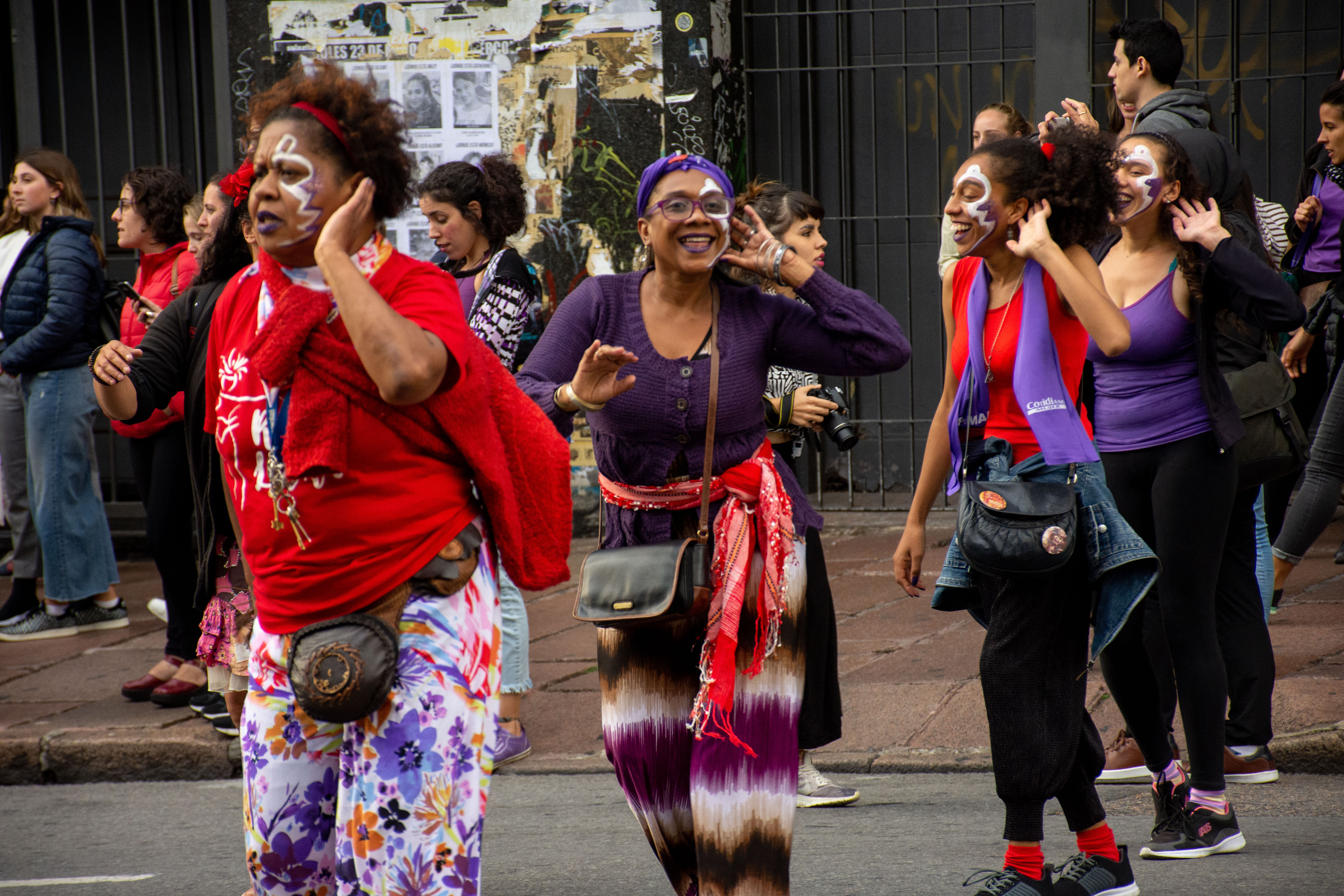 Los grupos La Melaza y Afrogama marcharon desde el candombe, en el marco de la Huelga Feminista del 8 de marzo de 2019. Cobertura colaborativa 8M2019.